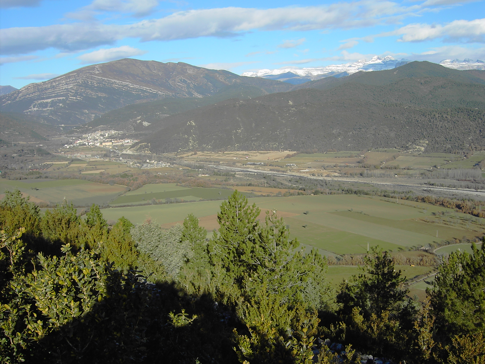 Boltaña y el bajo Valle del Ara vistos desde Guaso, en Sobrarbe.